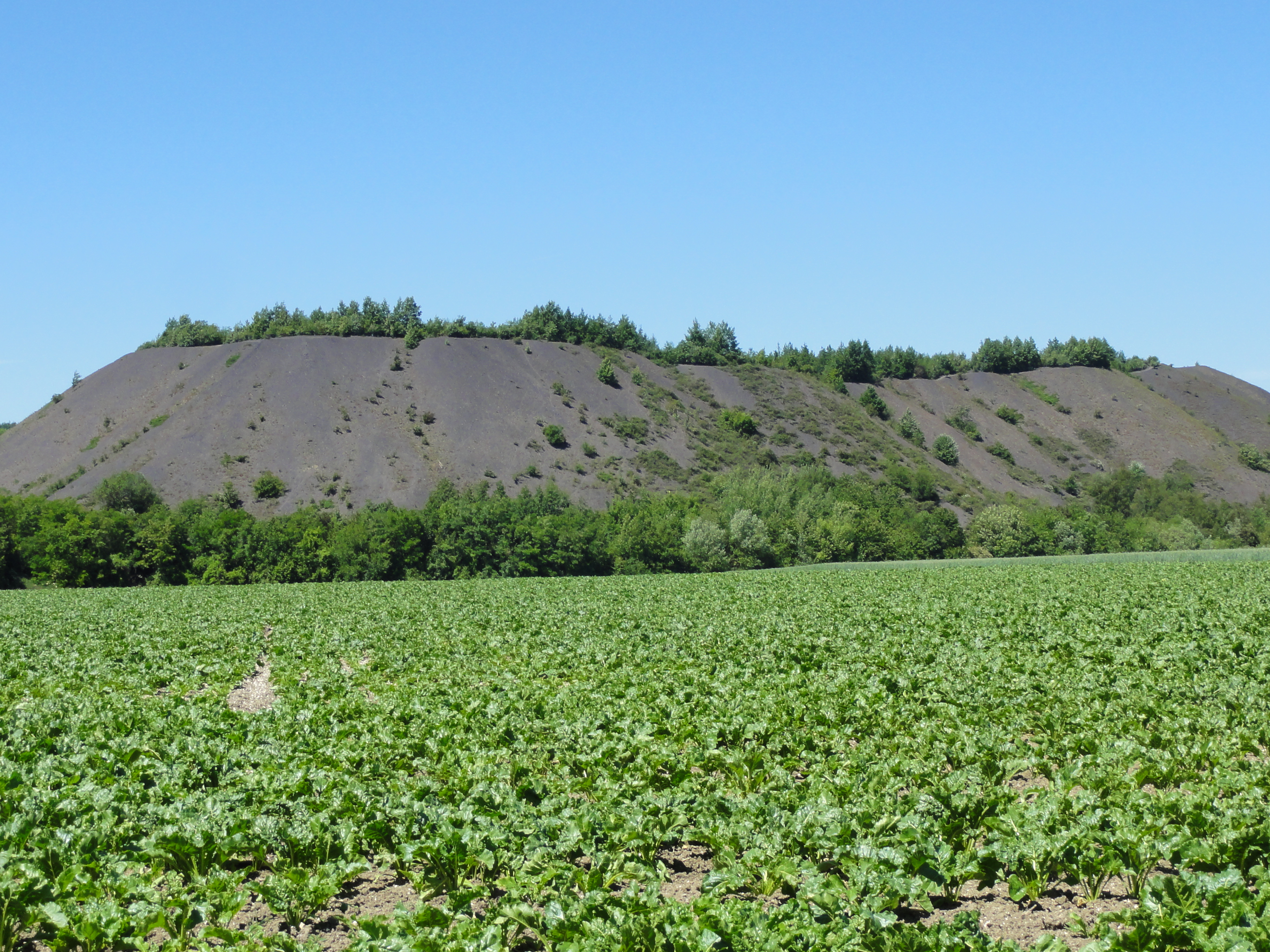 Terril no 58A dit Lavoir Mazingarbe Est, Lavoir de Mazingarbe de la Compagnie des mines de Béthune dans le bassin minier du Nord-Pas-de-Calais, Grenay et Mazingarbe, Pas-de-Calais, Nord-Pas-de-Calais, France. Le terril no 58A est inscrit sur la liste du patrimoine mondial par l'Unesco le 30 juin 2012 et y constitue en partie le site no 84.